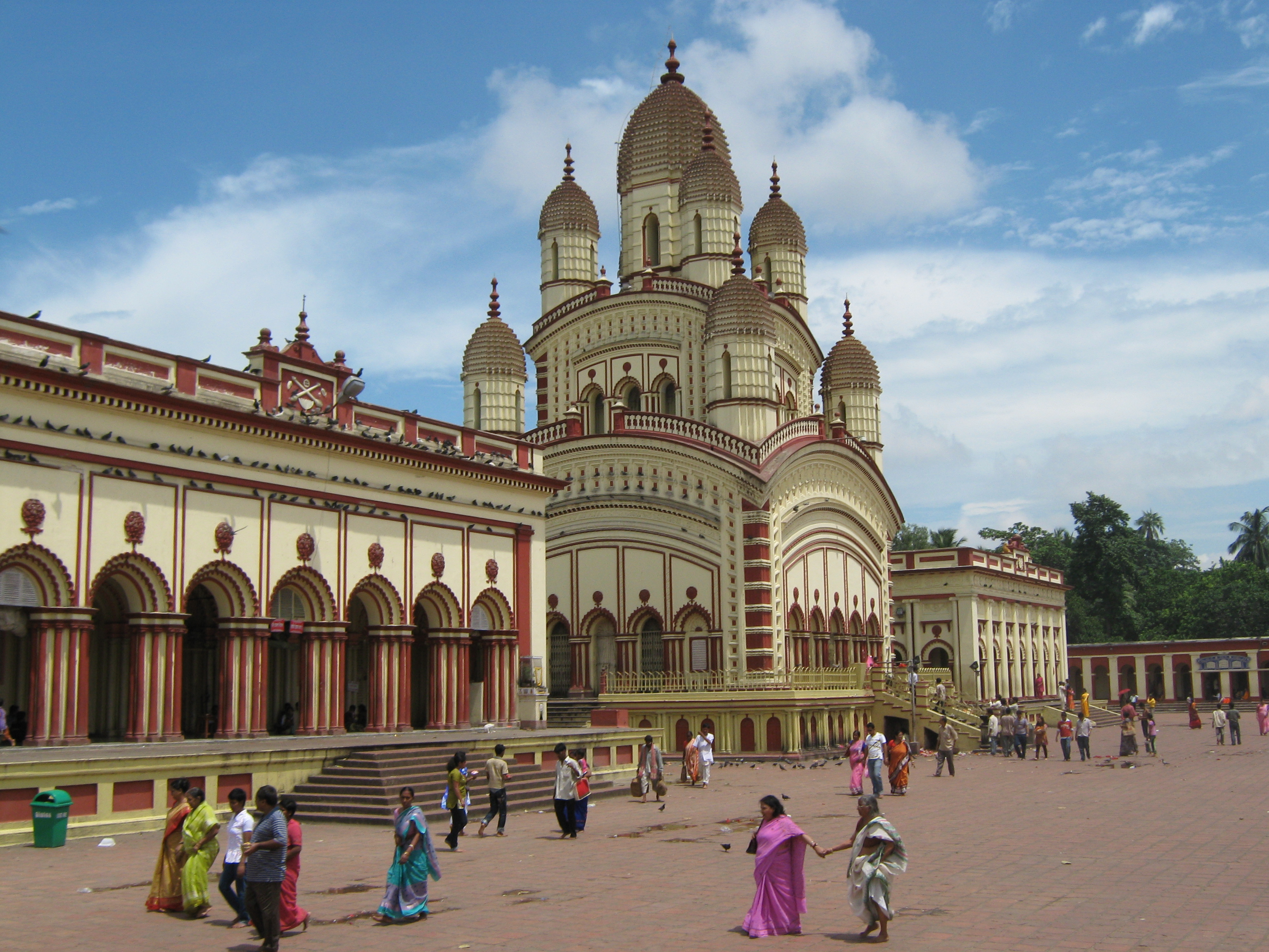 Dakhineshwar Kali temple